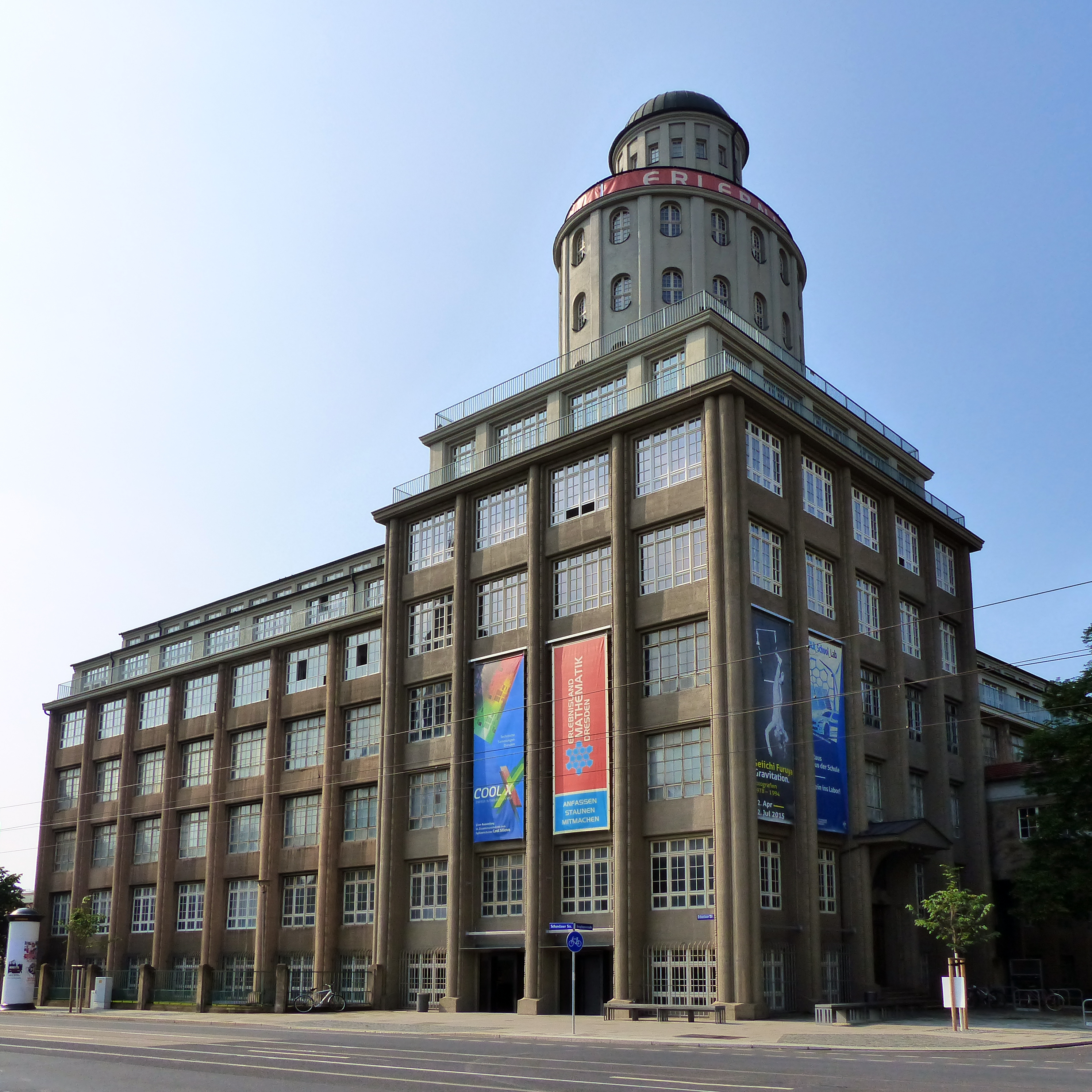 Museum Technische Sammlungen Dresden, Dresden, Sachsen